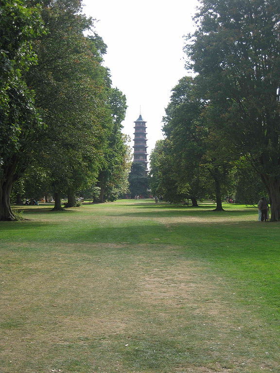 Királyi Botanikus Kertek - Kew Gardens